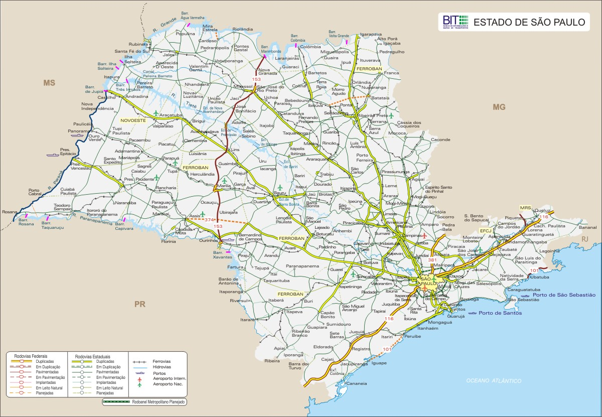 Mapa viário de São Paulo.